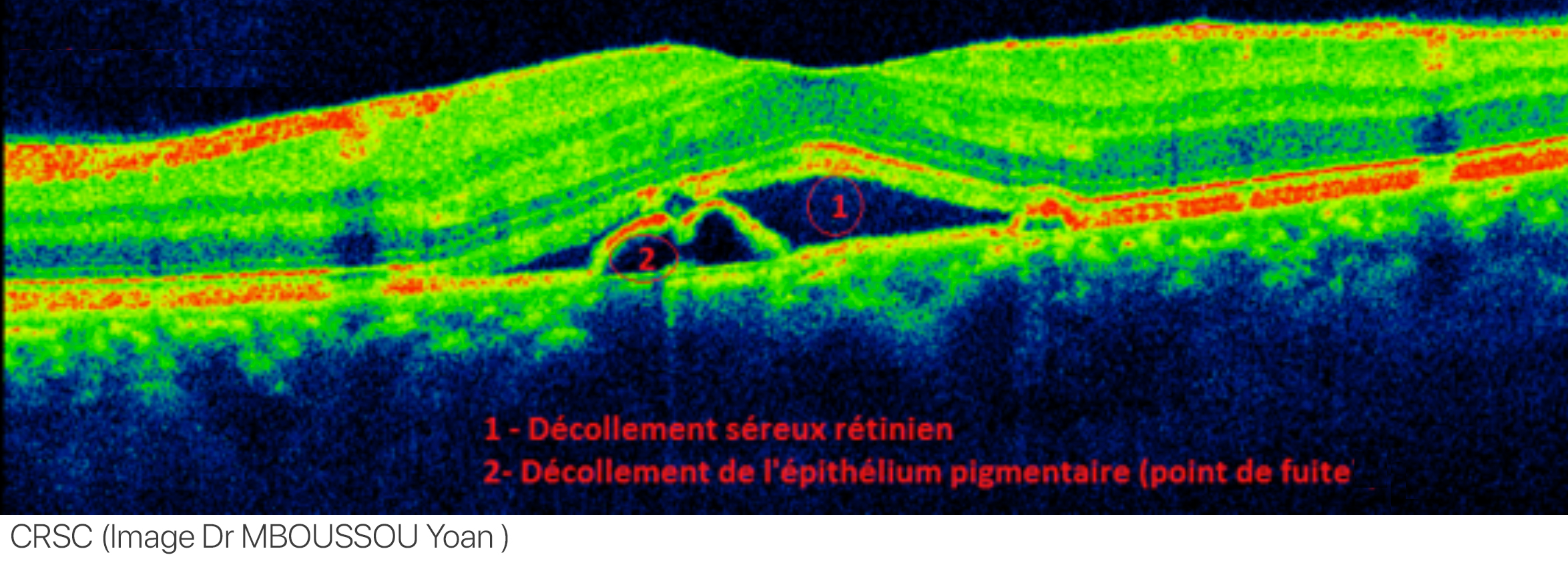 Central serous retinopathy